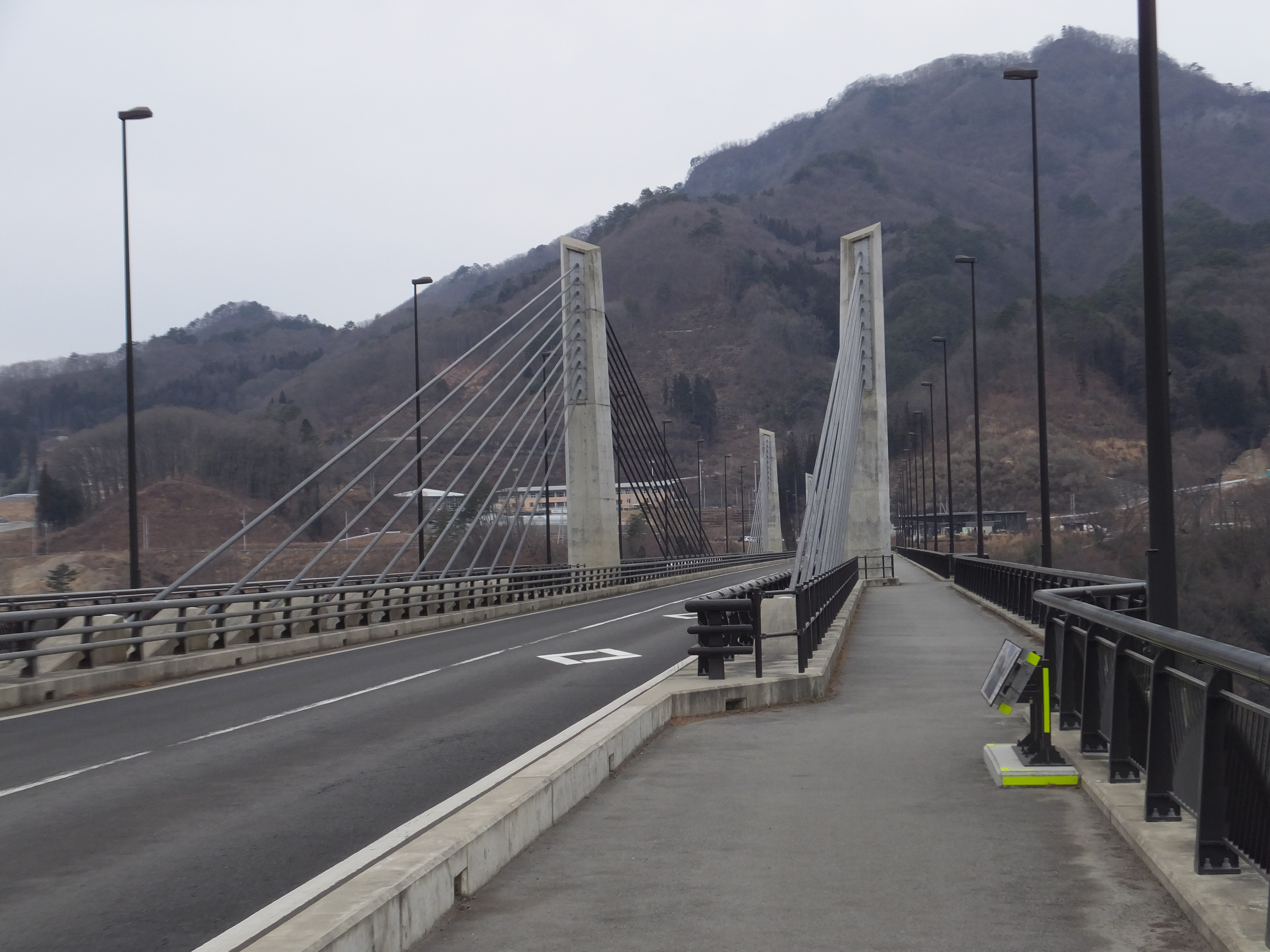 川原湯側からの不動大橋